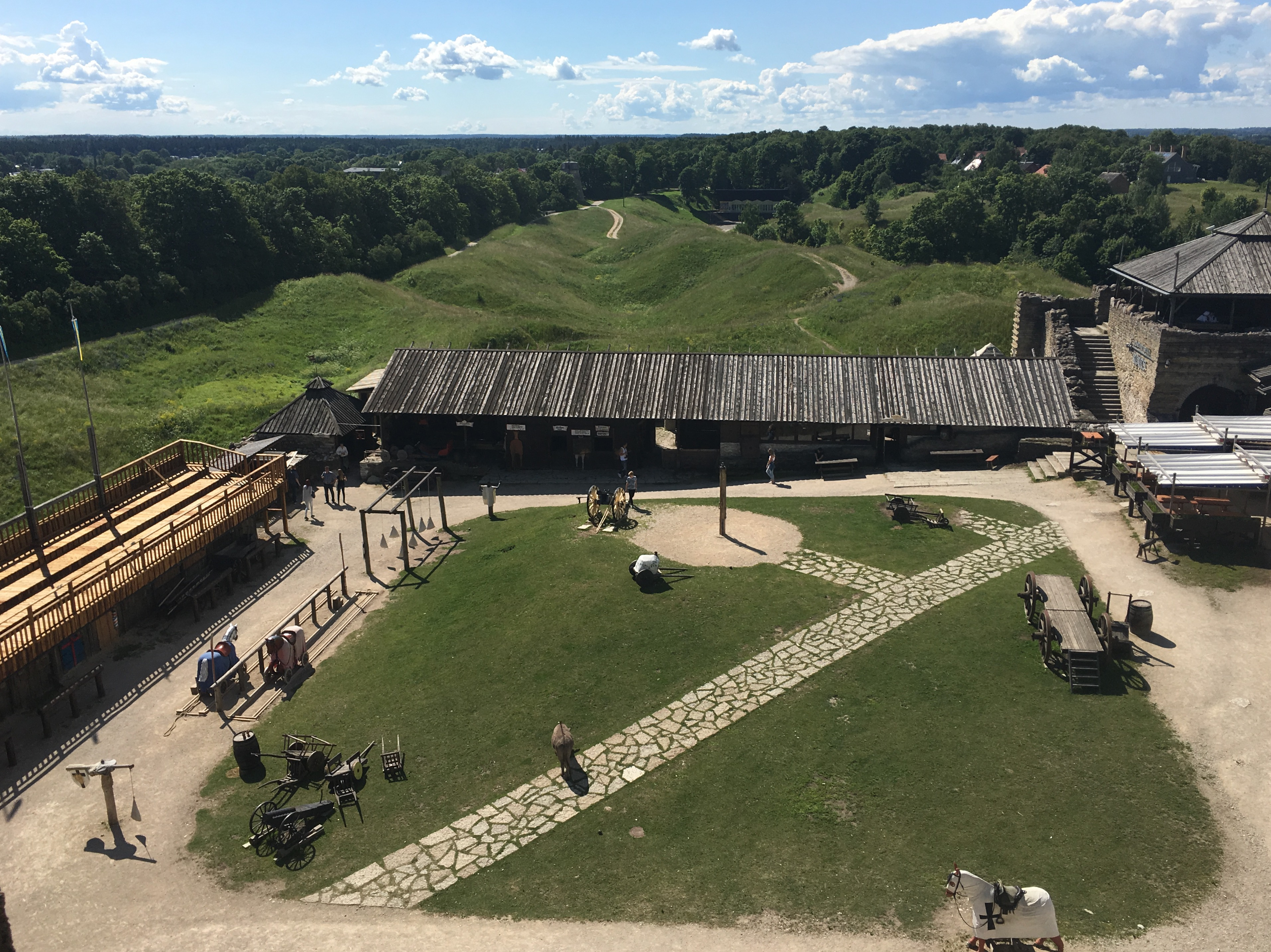 Замок Раквере